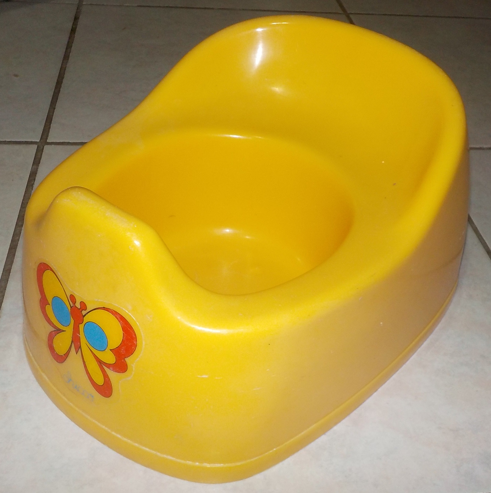 Vasino Chicco fine anni '70